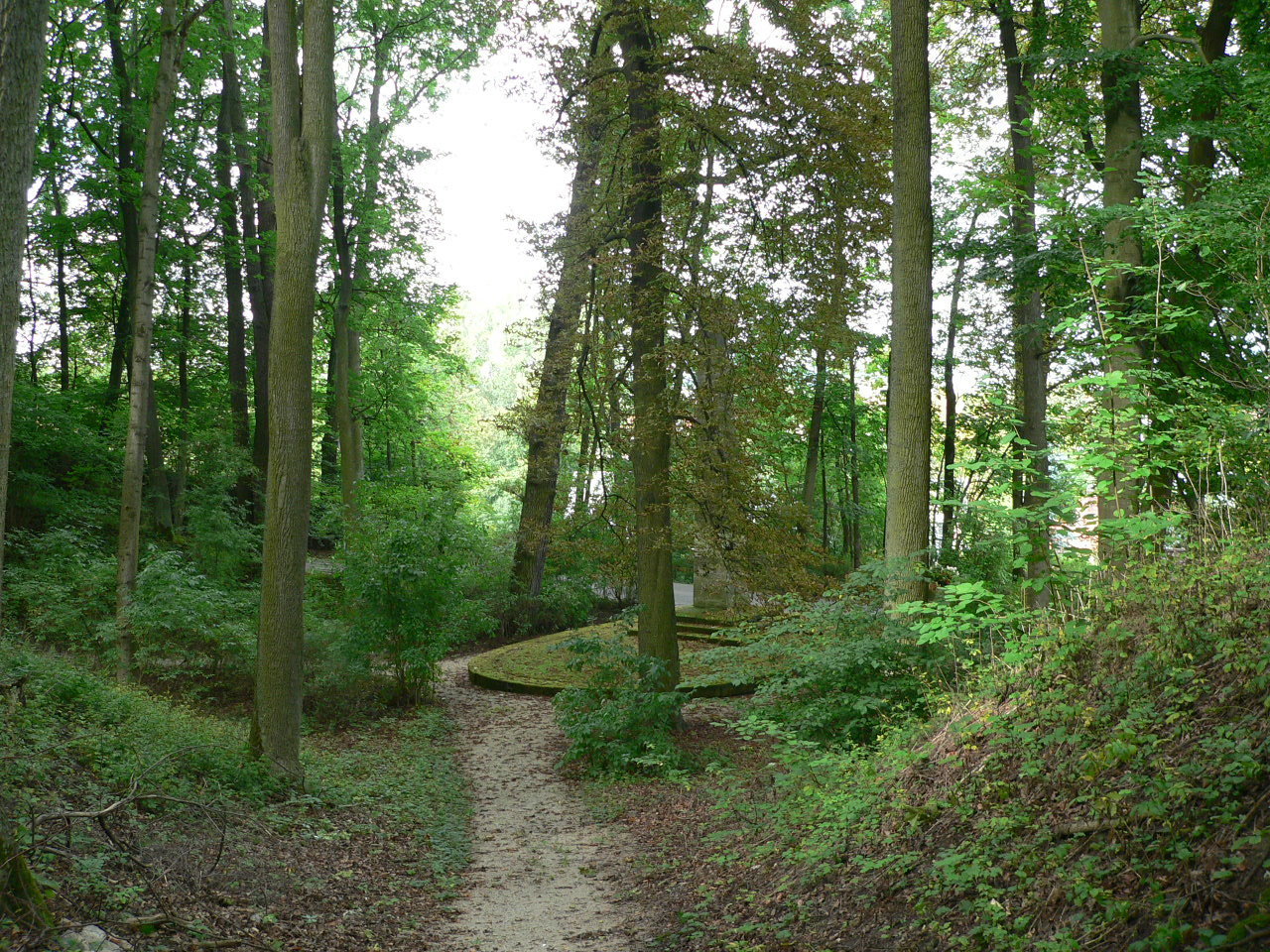 Bergpark von Schloss Falkenegg in Coburg